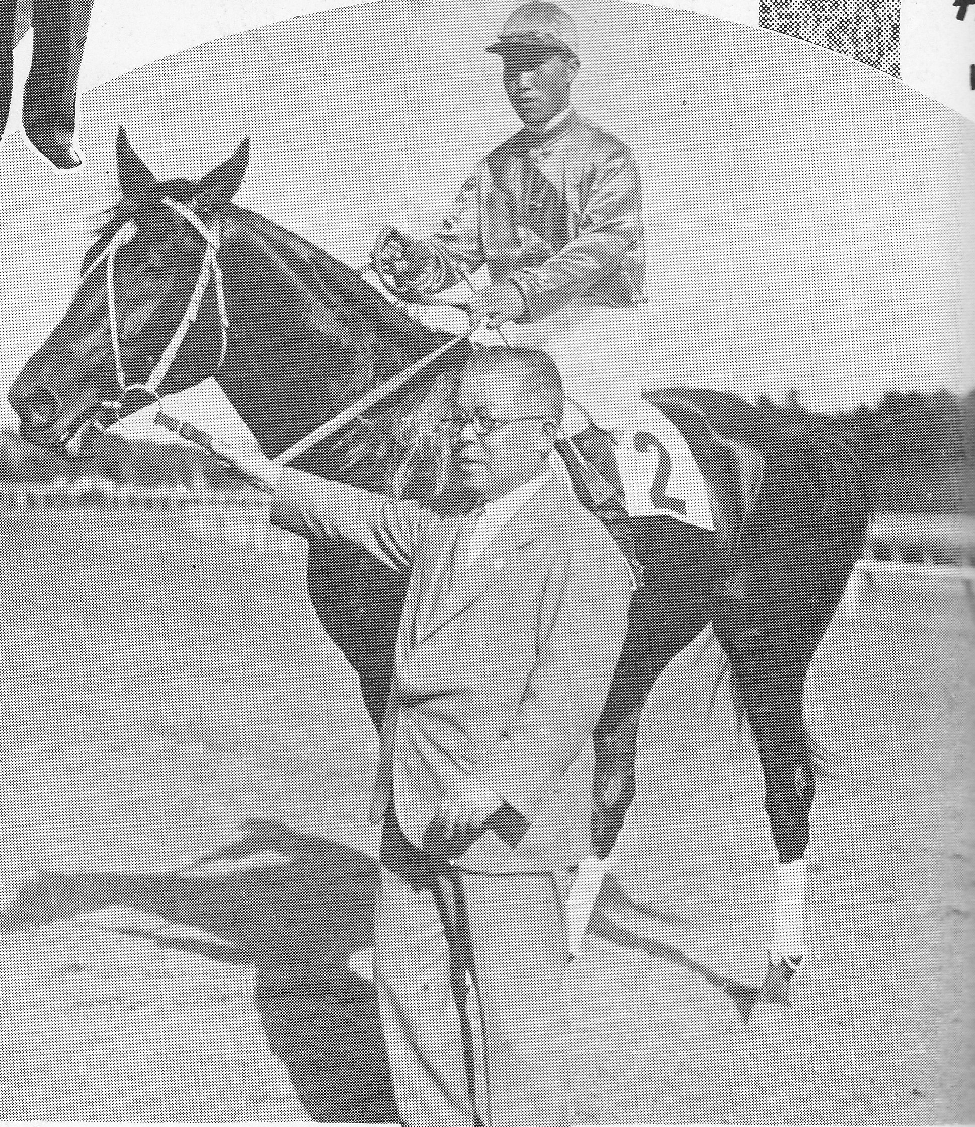 農林省賞典障碍優勝後のオーシス